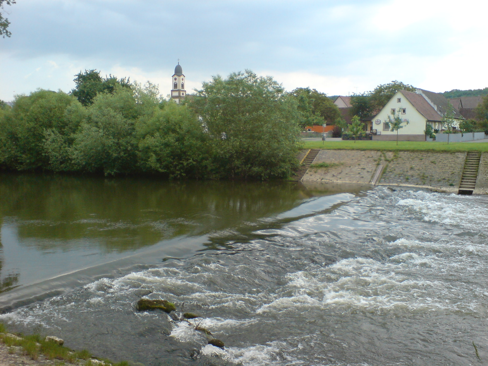 Schwelle unweit des Untergriesheimer Pegels, Jagst, Durchfluss zum Aufnahmezeitpunkt 13m3/s